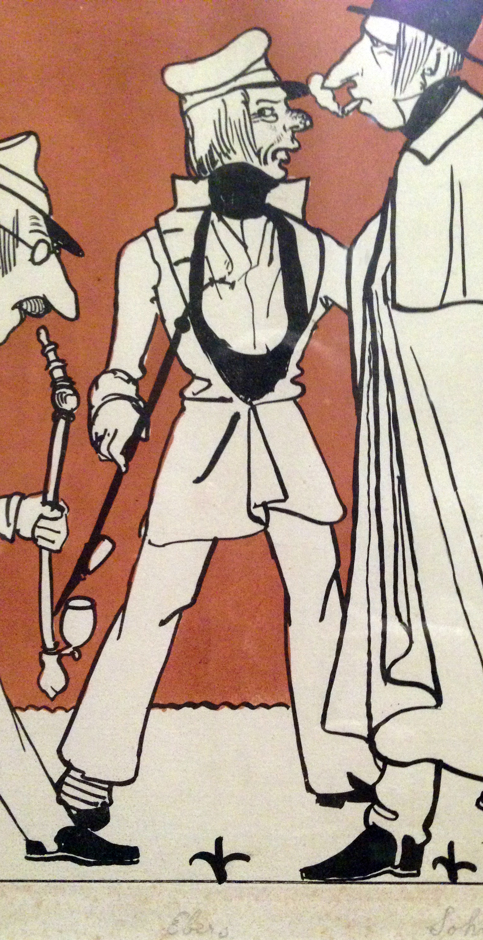 "Zug der Düsseldorfer Künstler" von 1837, Karikatur seiner malenden Zeitgenossen I, Andreas Achenbach – Ausschnitt Emil Ebers